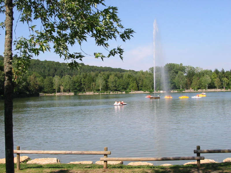 Lac de la Folie. Contrexéville (Vosges).